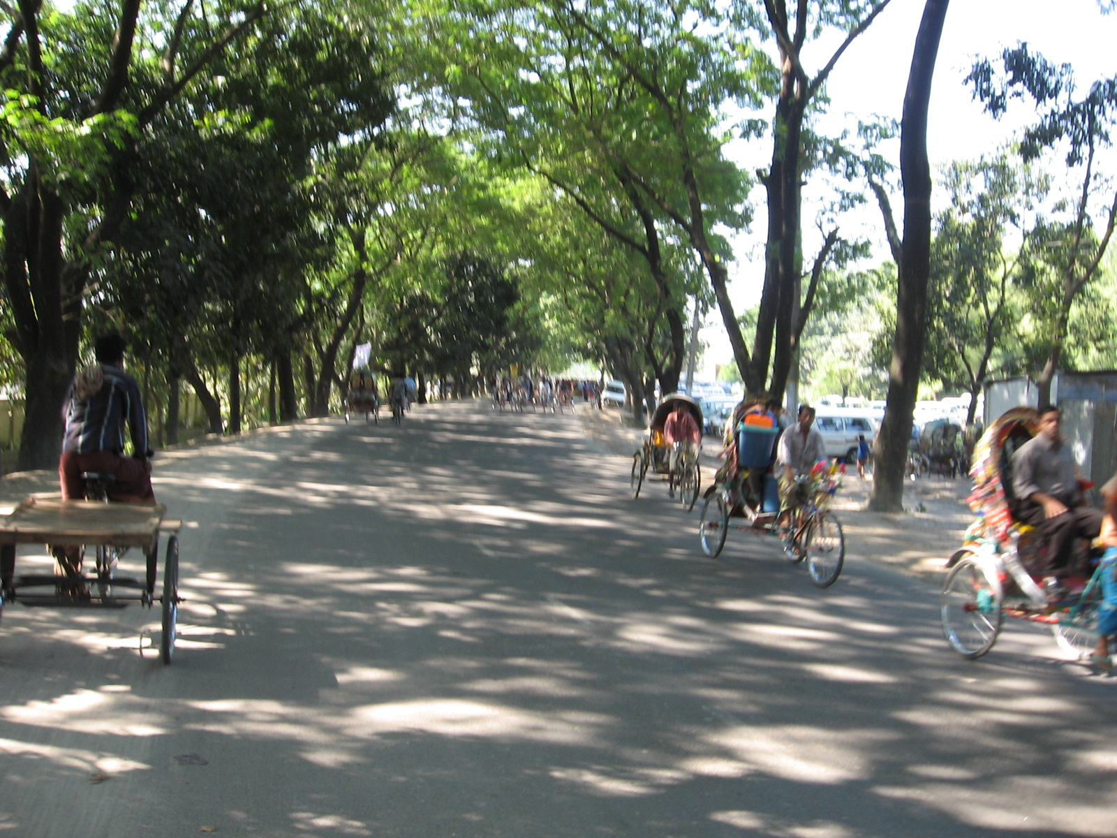 Main road in Tangail